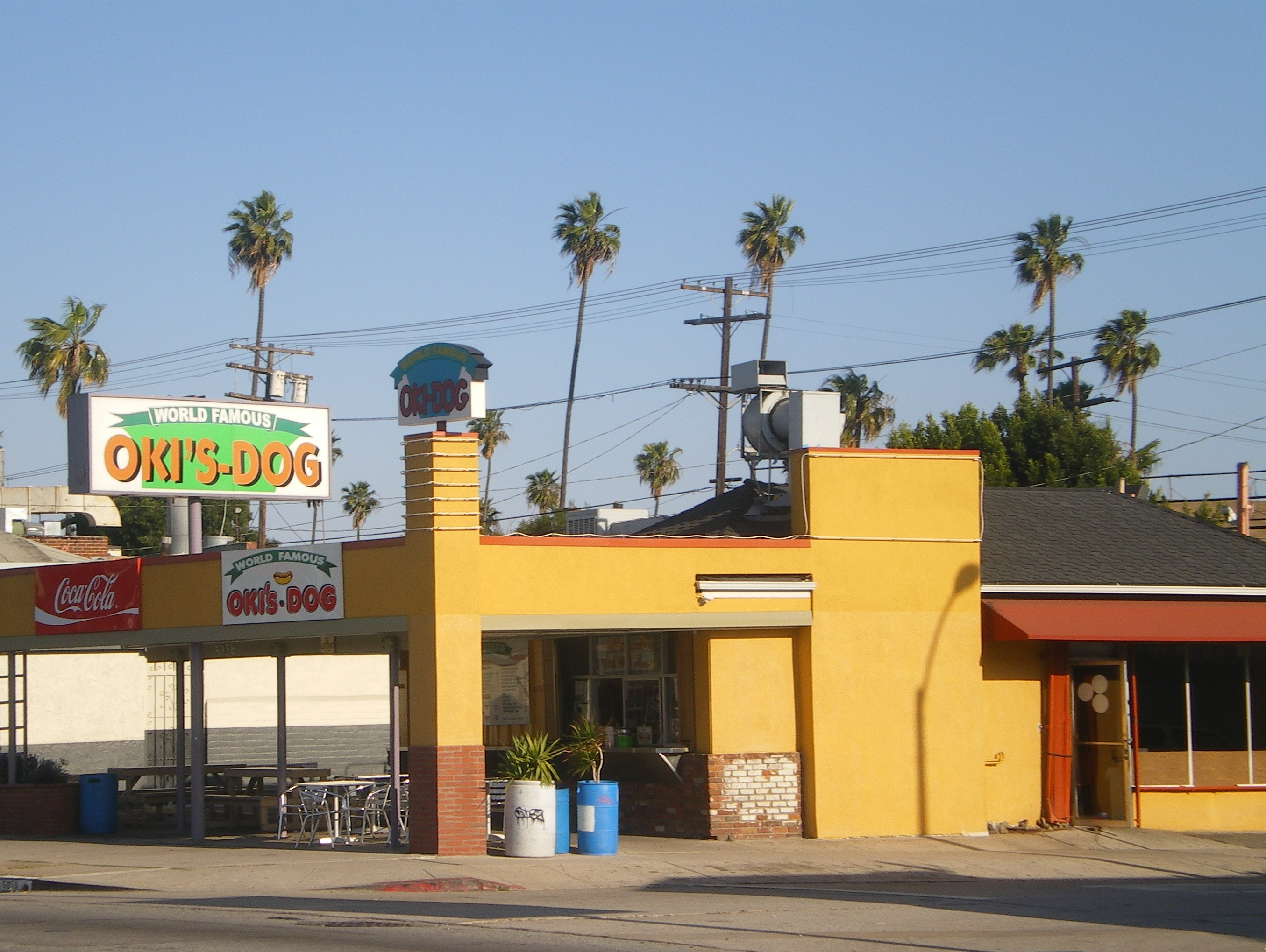 Oki's Dog, 5056 W Pico Blvd., Los Angeles, CA 90019